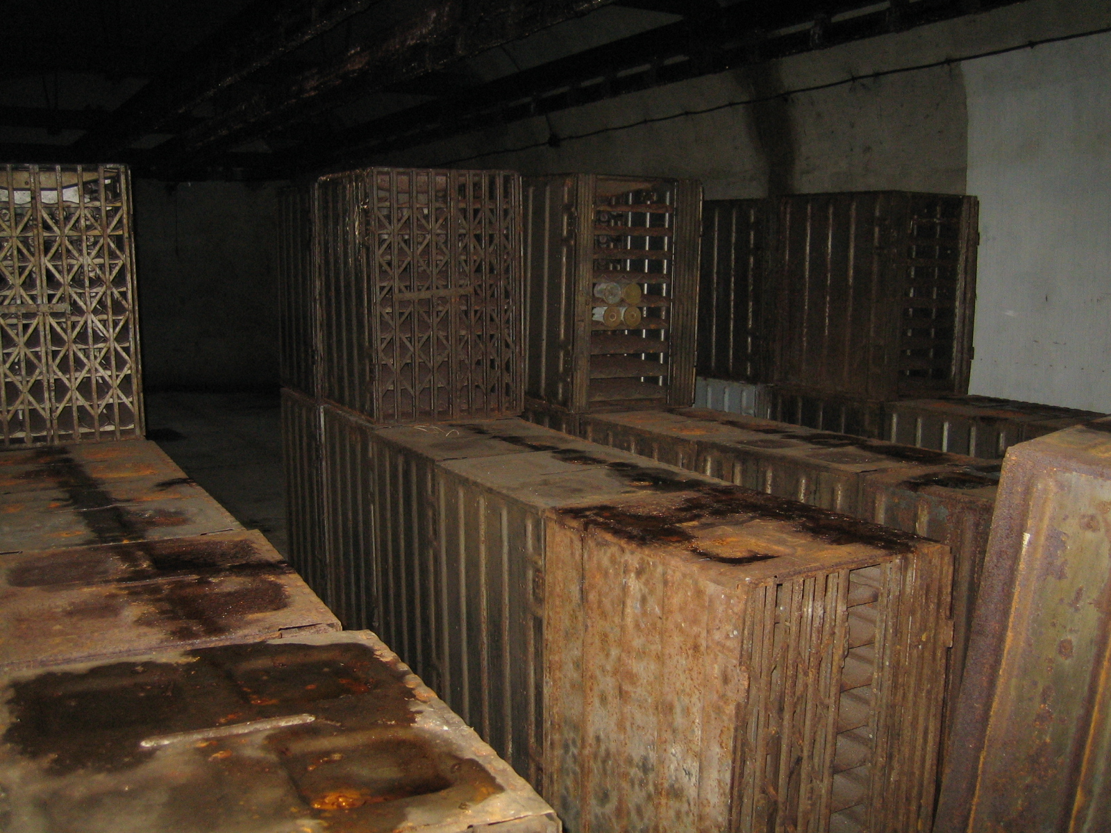 Munitionslager von Four à Chaux